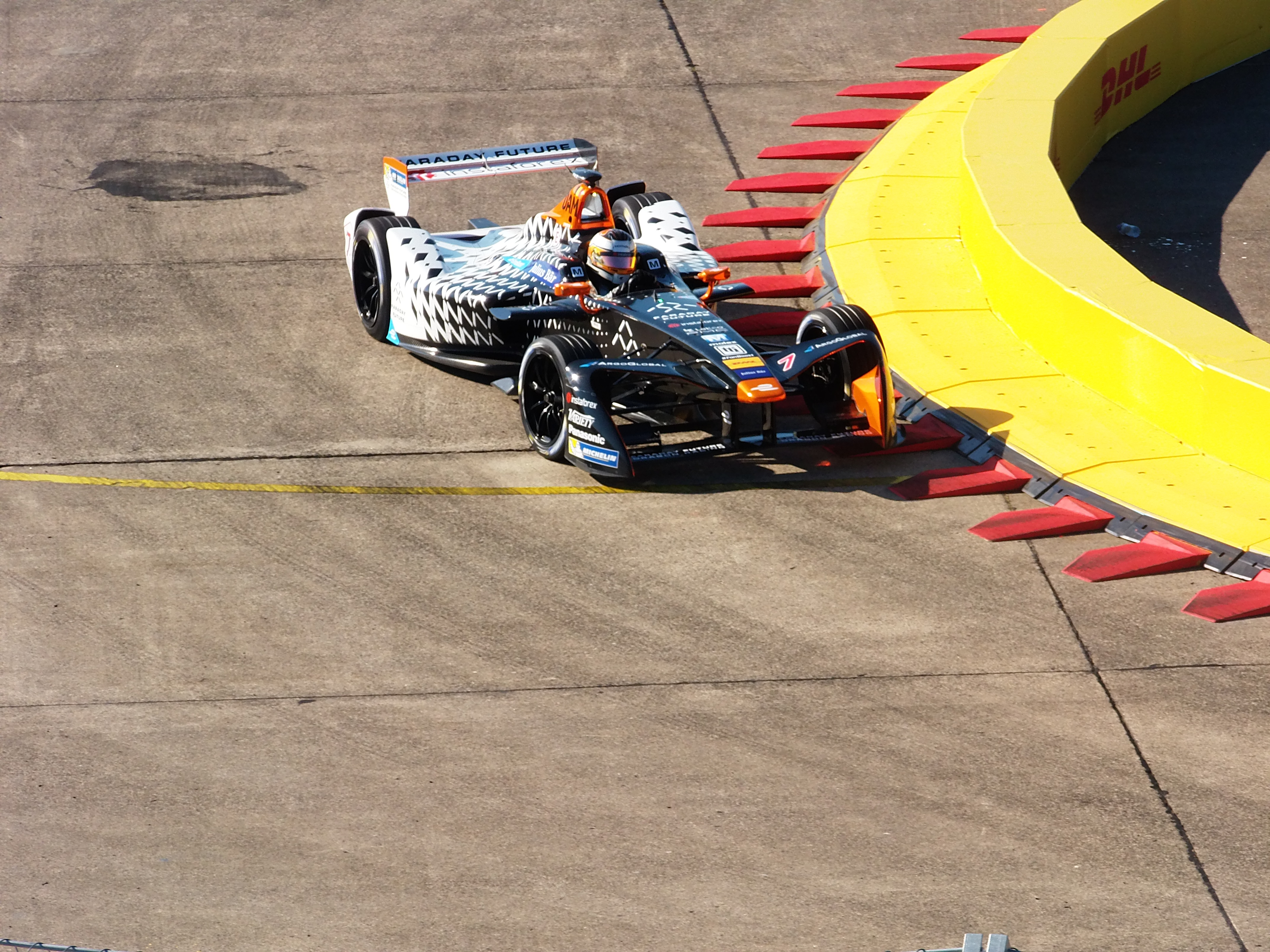 Jérôme D’Ambrosio (Dragon Racing) beim Berlin ePrix 2017